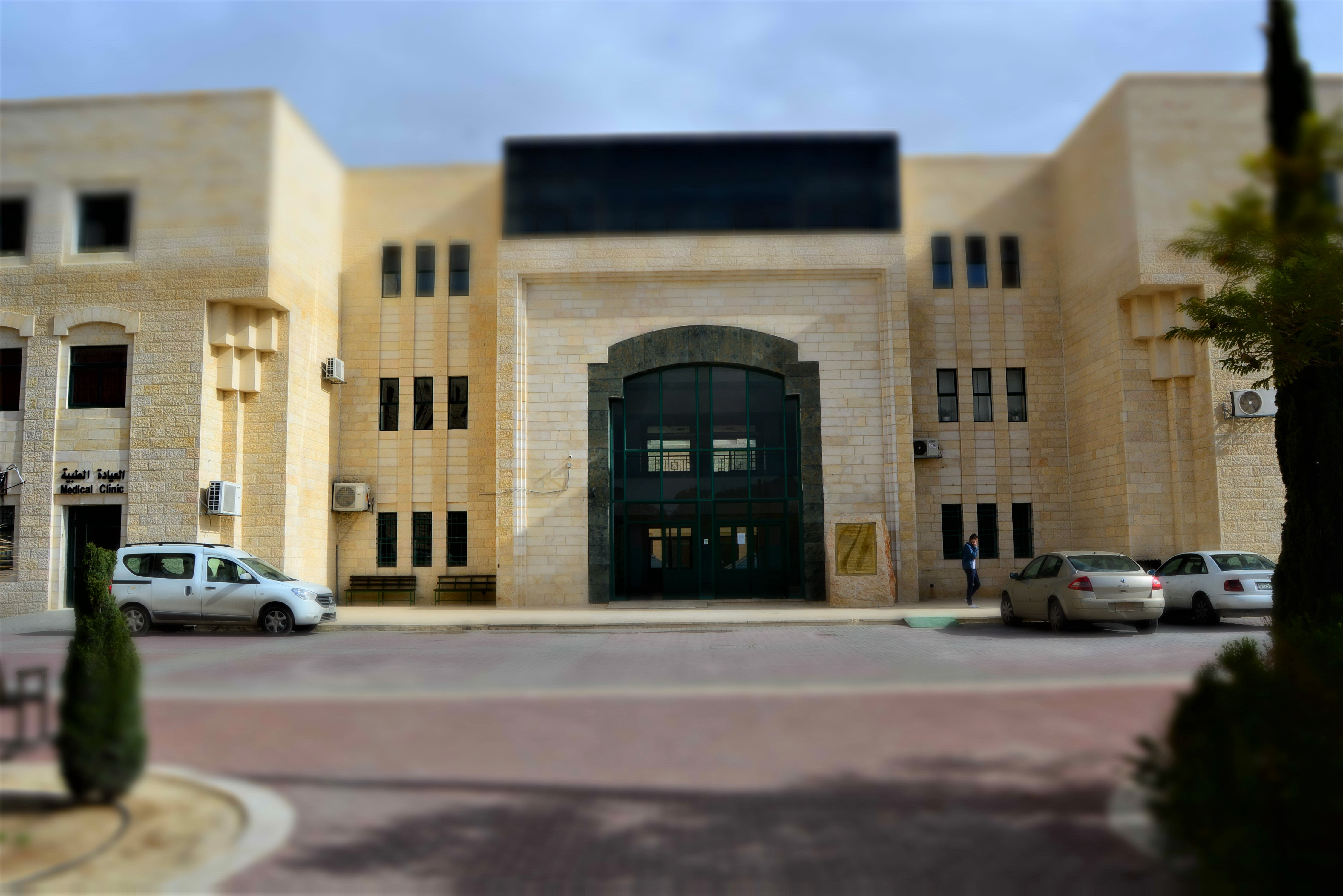 مبنى المجمع الصحي